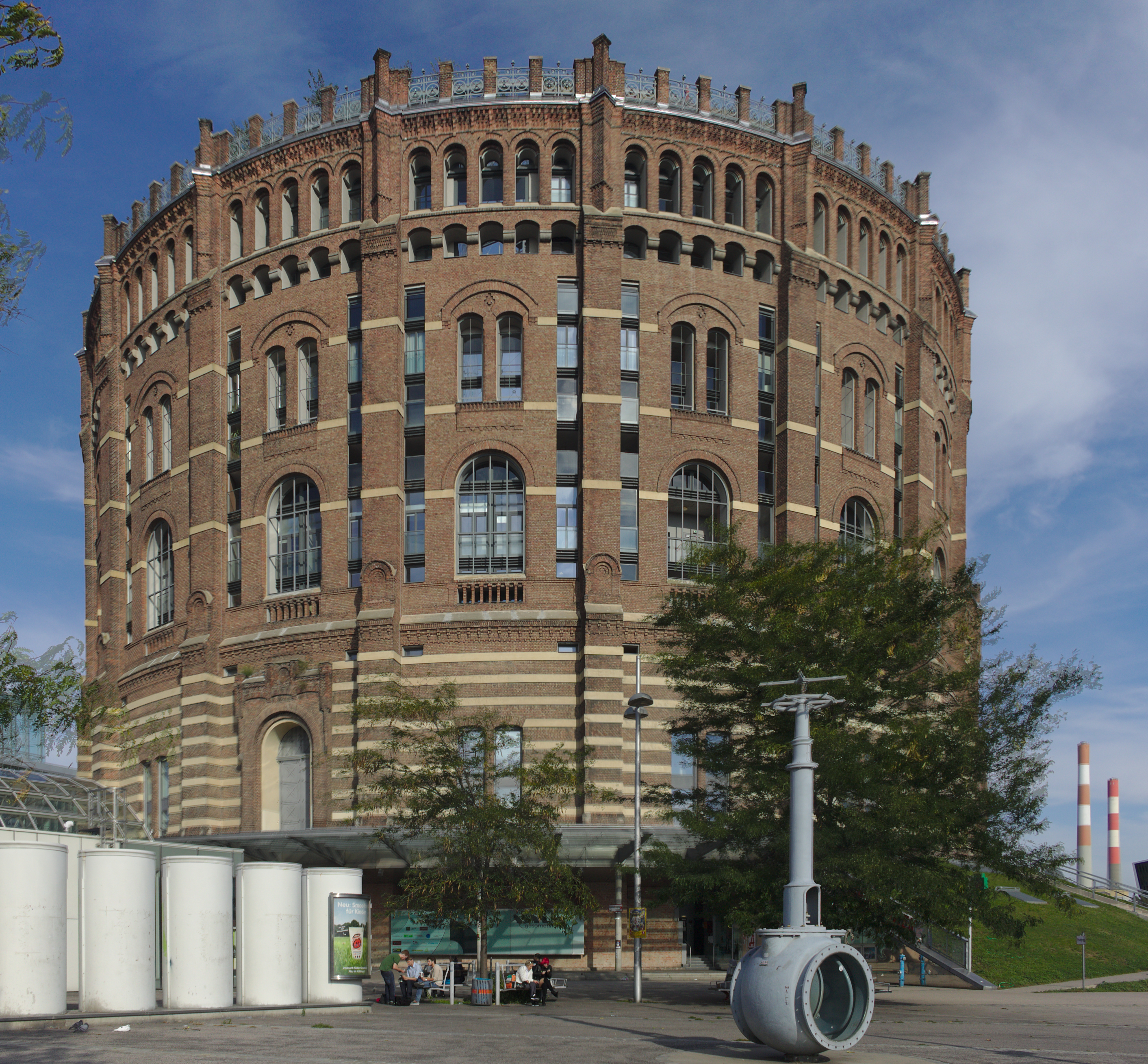 Gasometer, Teleskopgasbehälter Nr.1 - 4